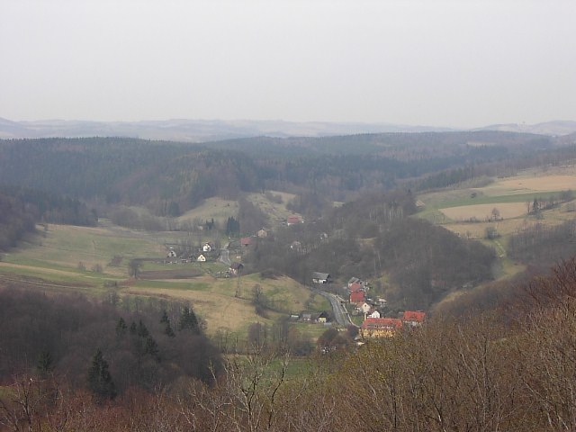 Łupki – wieś w Polsce położona w województwie dolnośląskim, w powiecie lwóweckim, w gminie Wleń.